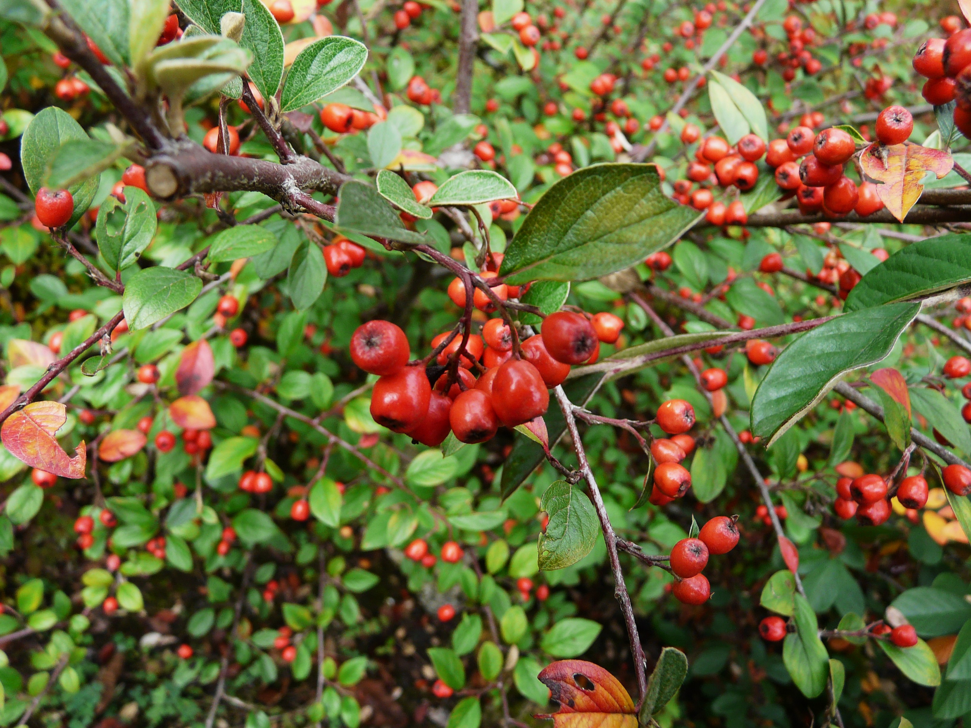 Baies de Cotonéaster de Franchet (Cotoneaster franchetii) à l'automne, Dordogne, France